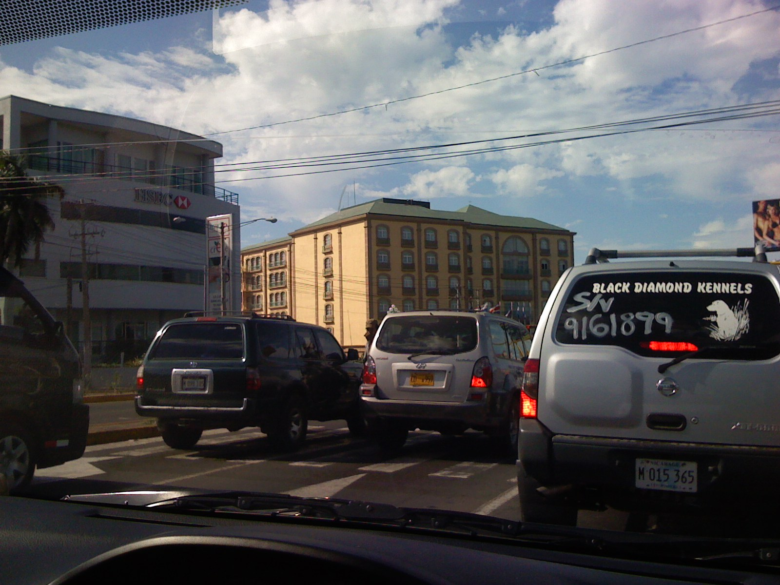 Carretera a Masaya e intersección con la Pista Miguel Obando y Bravo